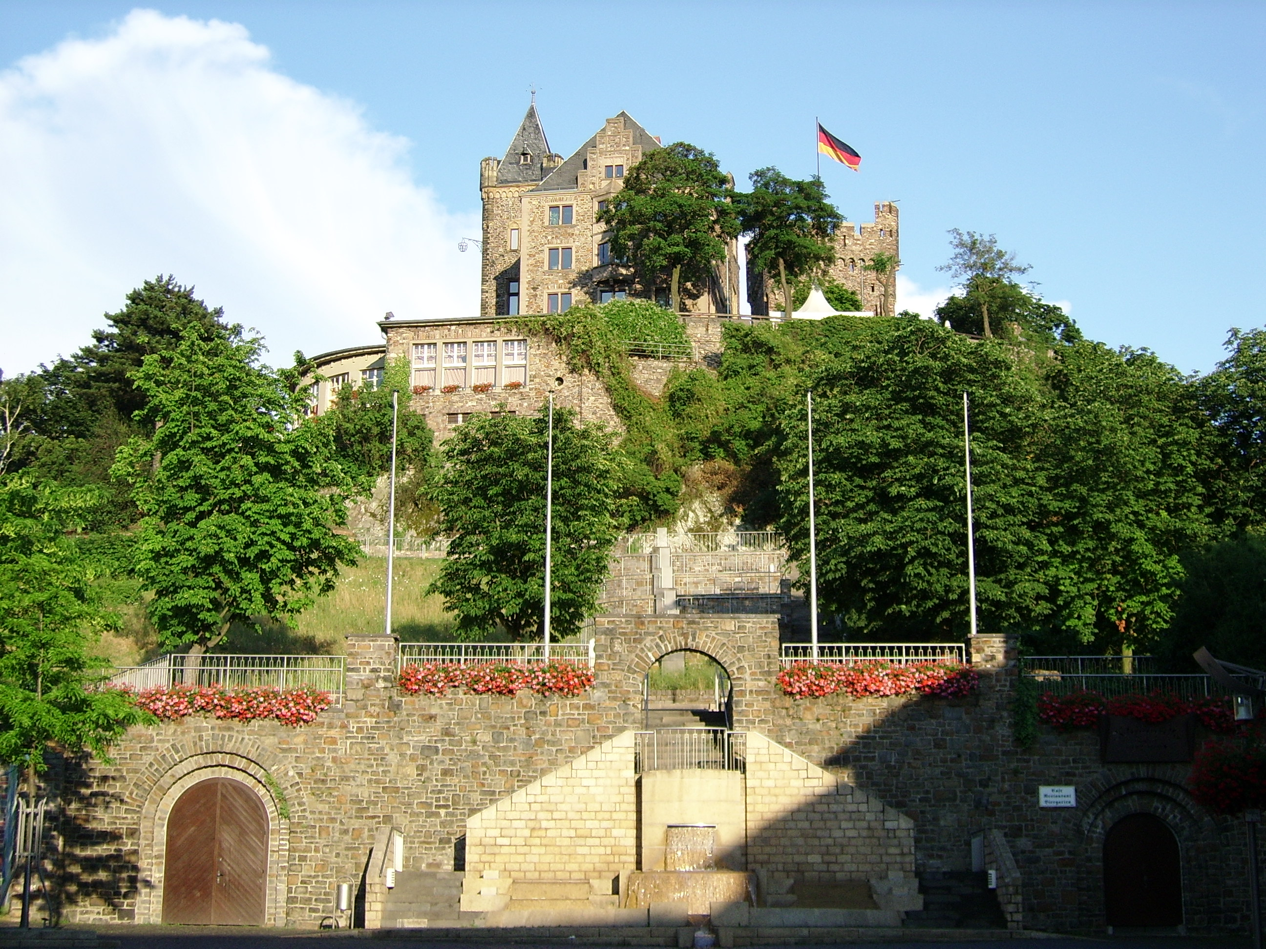 The Burg Klopp von Bingen-am-Rhein (Germany)